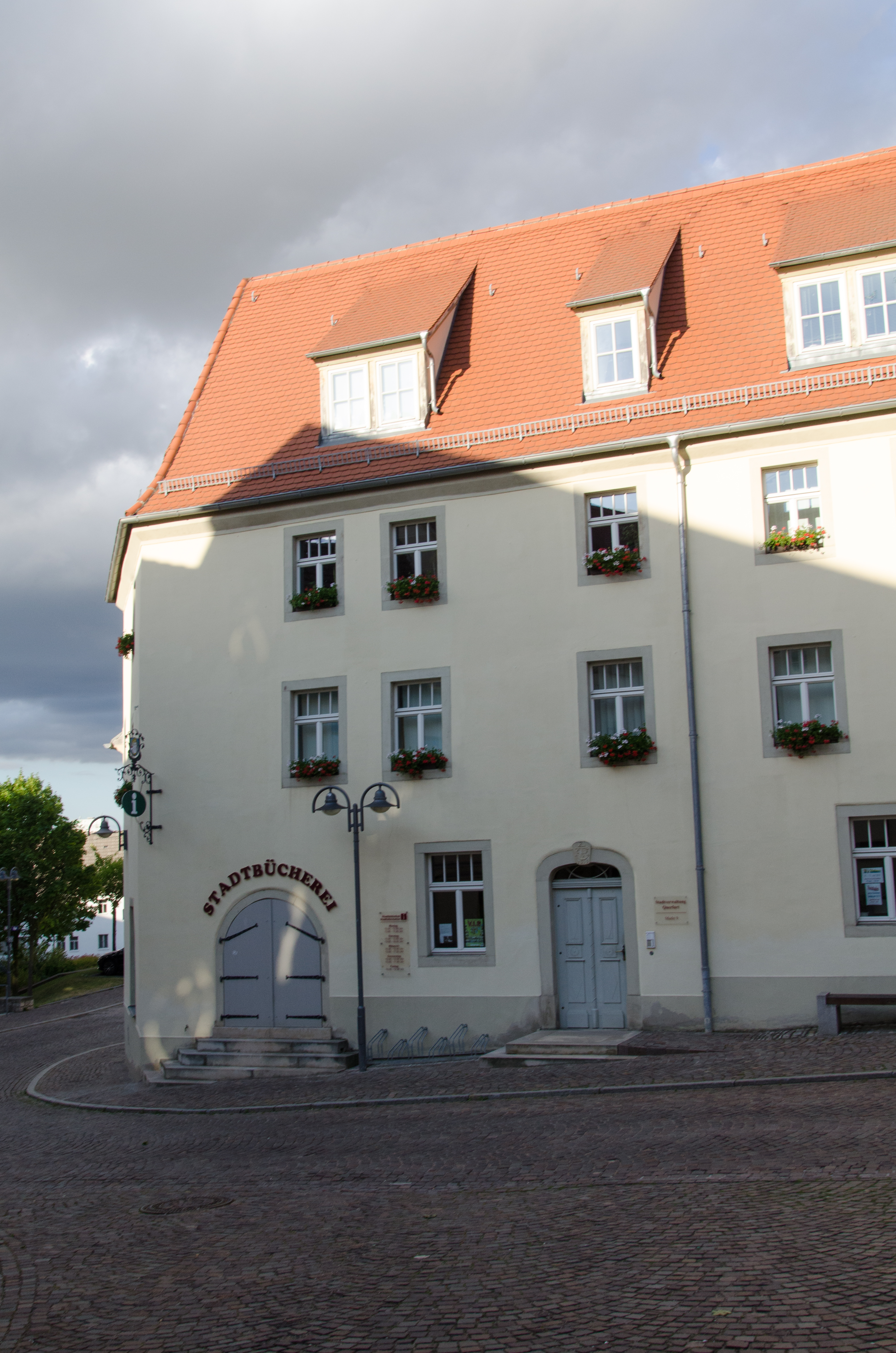 Querfurt, Markt 9